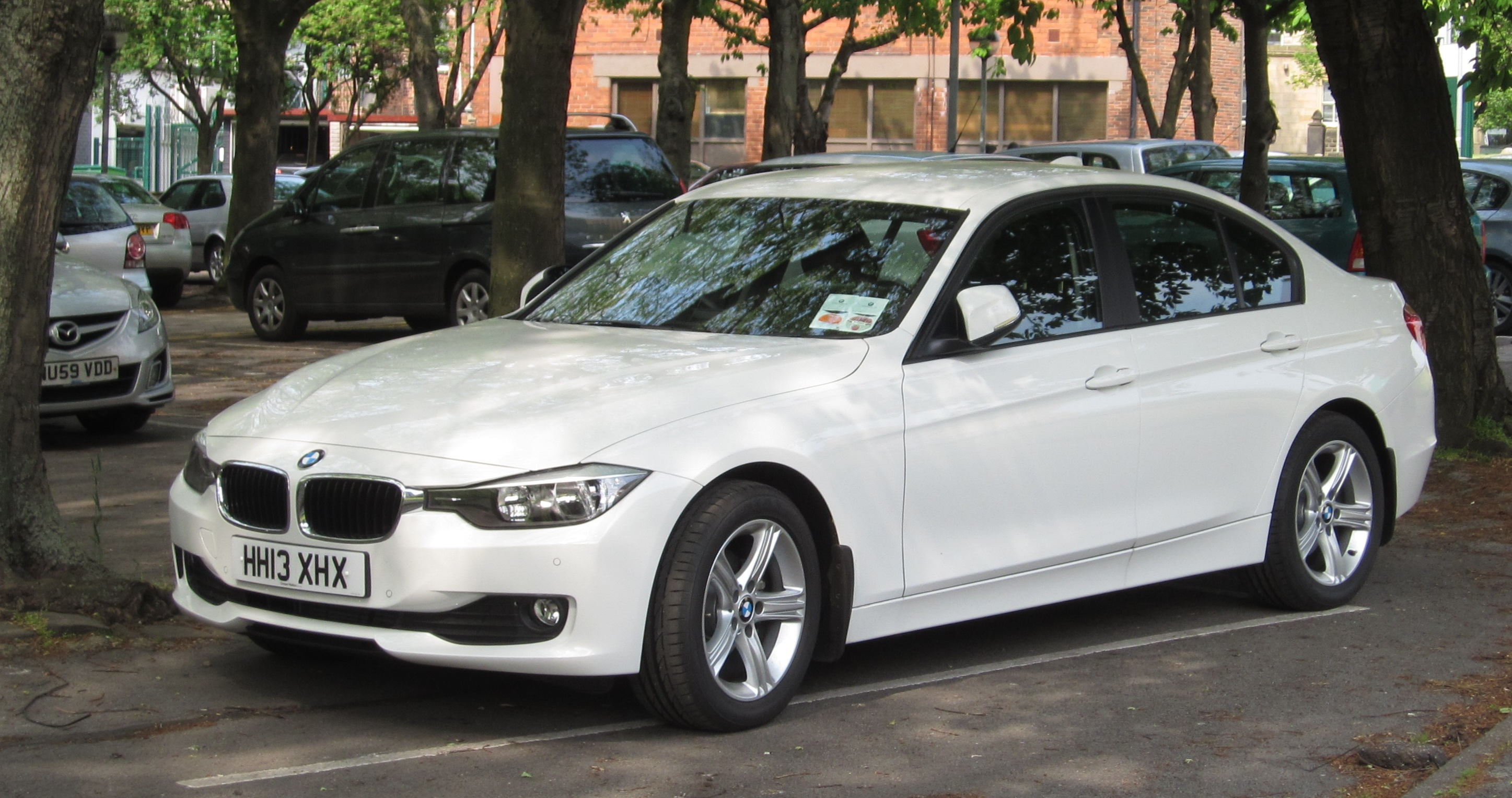 BMW 316i (F30) BMW 316i à Leeds